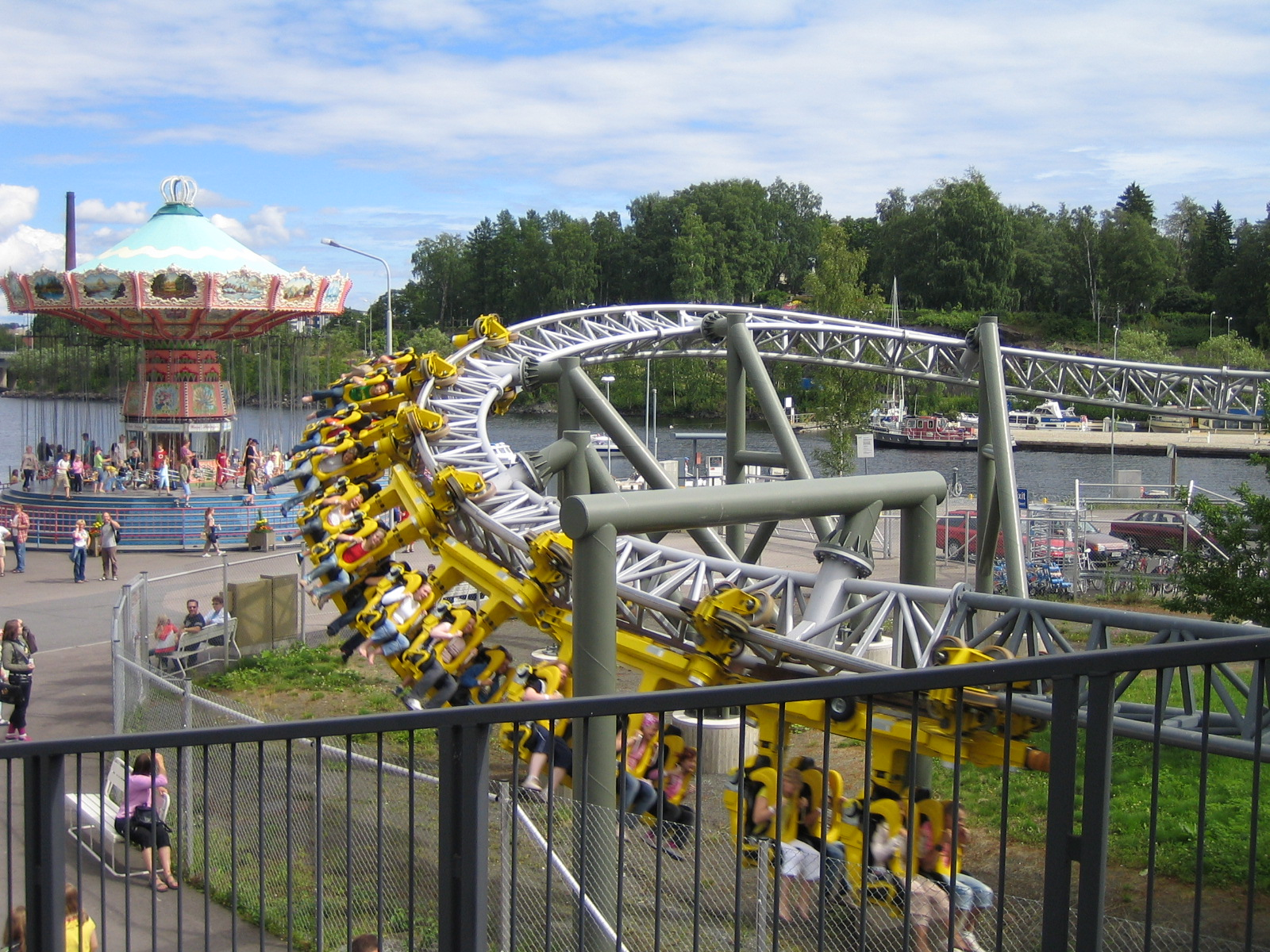 Särkänniemen Tornado